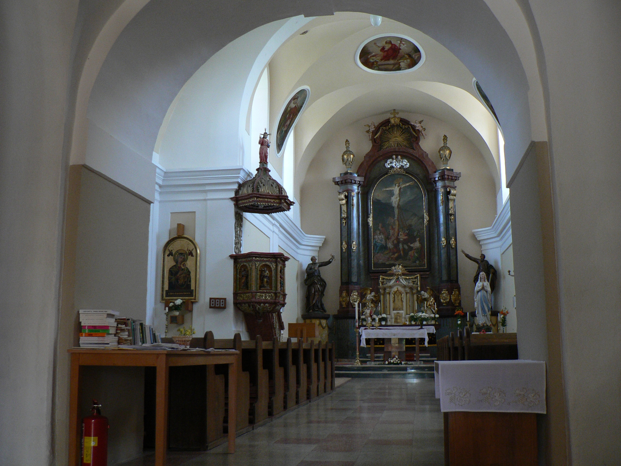 Kostel Povýšení svatého Kříže (Dubicko) - interiér